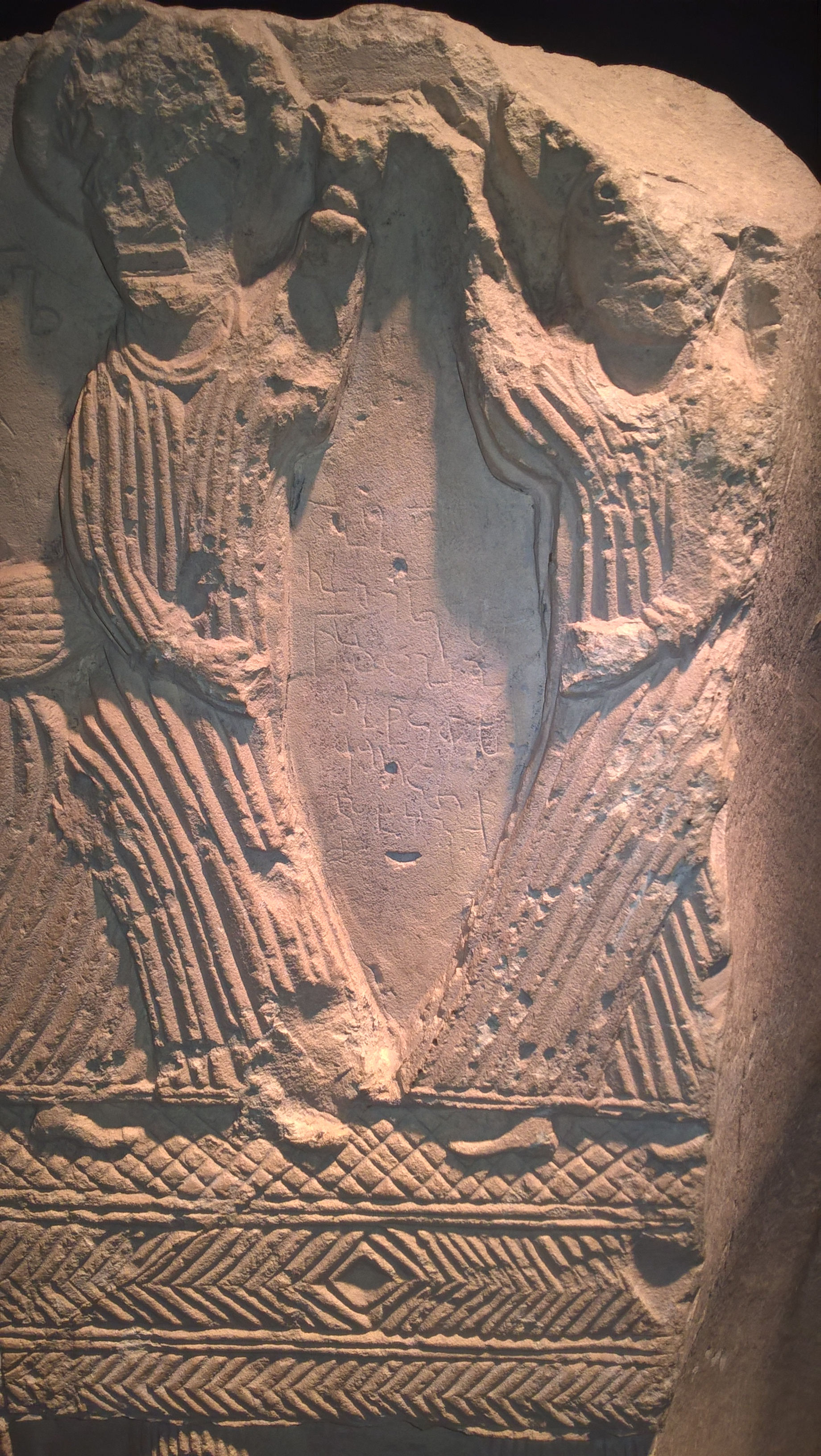 დავათის სტელის ფრაგმენტი, სადაც ჩაწერილია ყველაზე ადრეული ქართული ანბანი